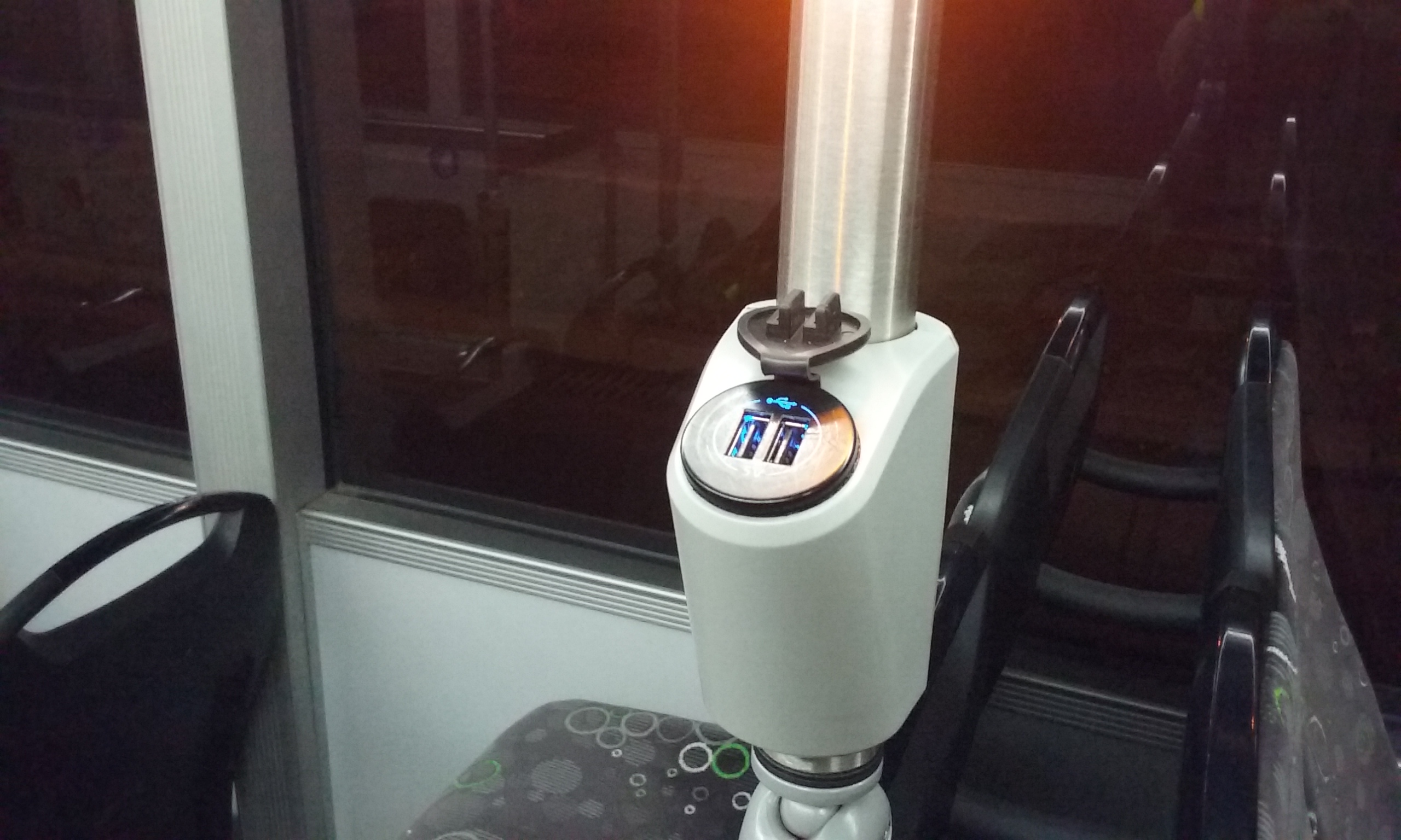 Tomaszów Mazowiecki w województwie łódzkim, PL, EU. Gniazdko USB w autobusie Nowego MZK, zakupionym w ramach odbudowy przedsiębiorstwa po 2014 roku. CC0